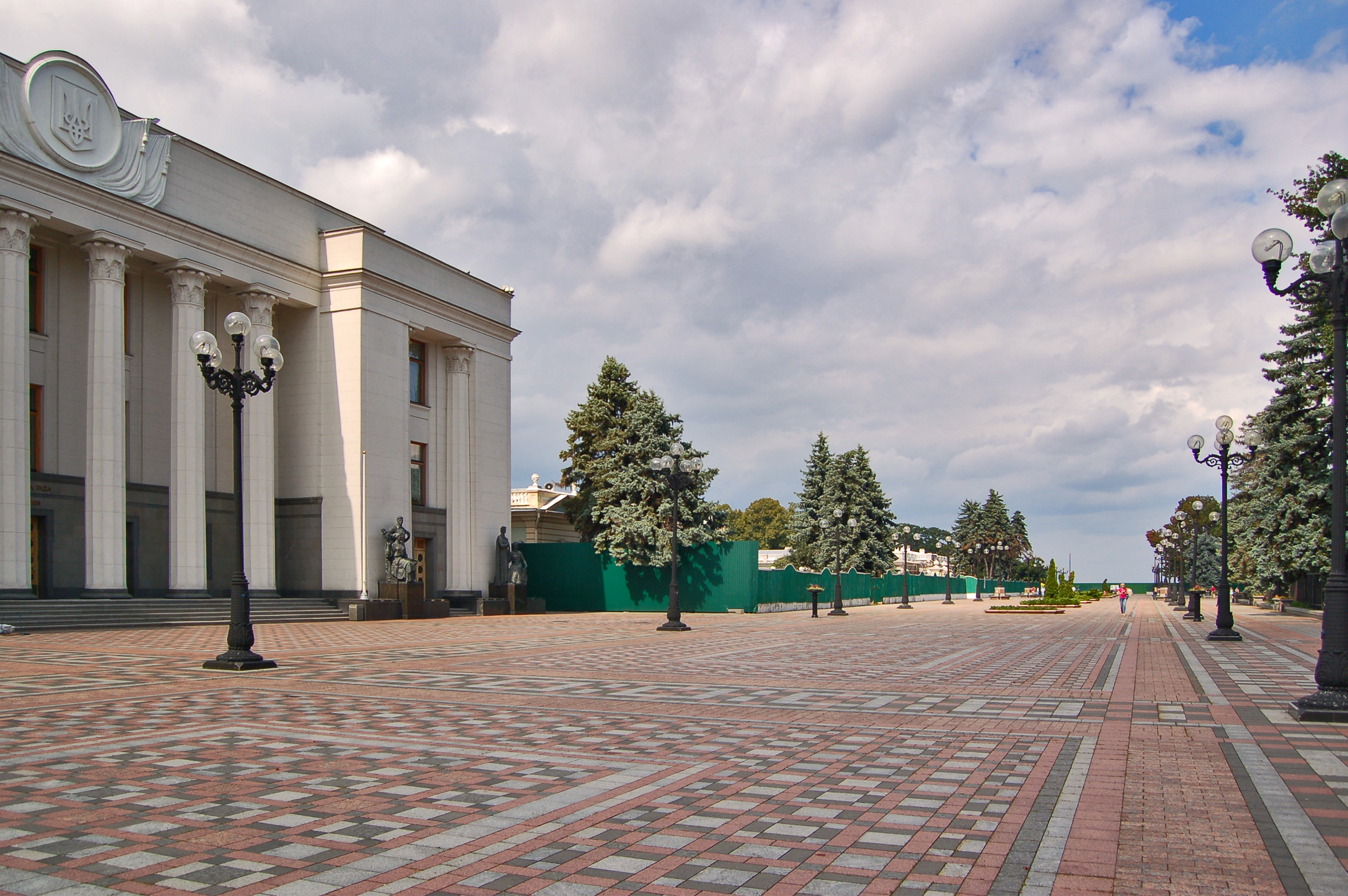 Площадь Конституции в Киеве